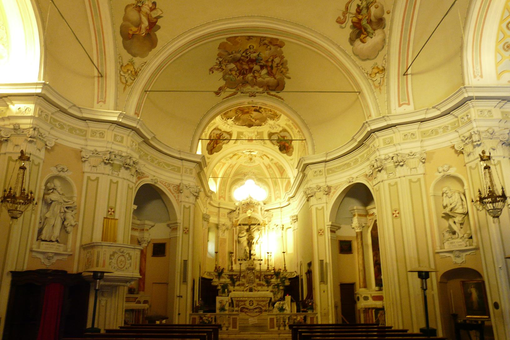 Chiesa parrocchiale dei Santi Pietro e Paolo (XVII secolo), Testico, Liguria, Italia